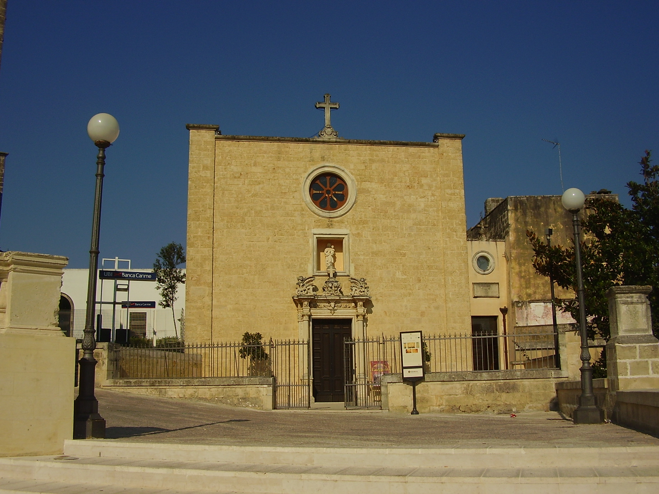 Chiesa del Carmine Ruffano